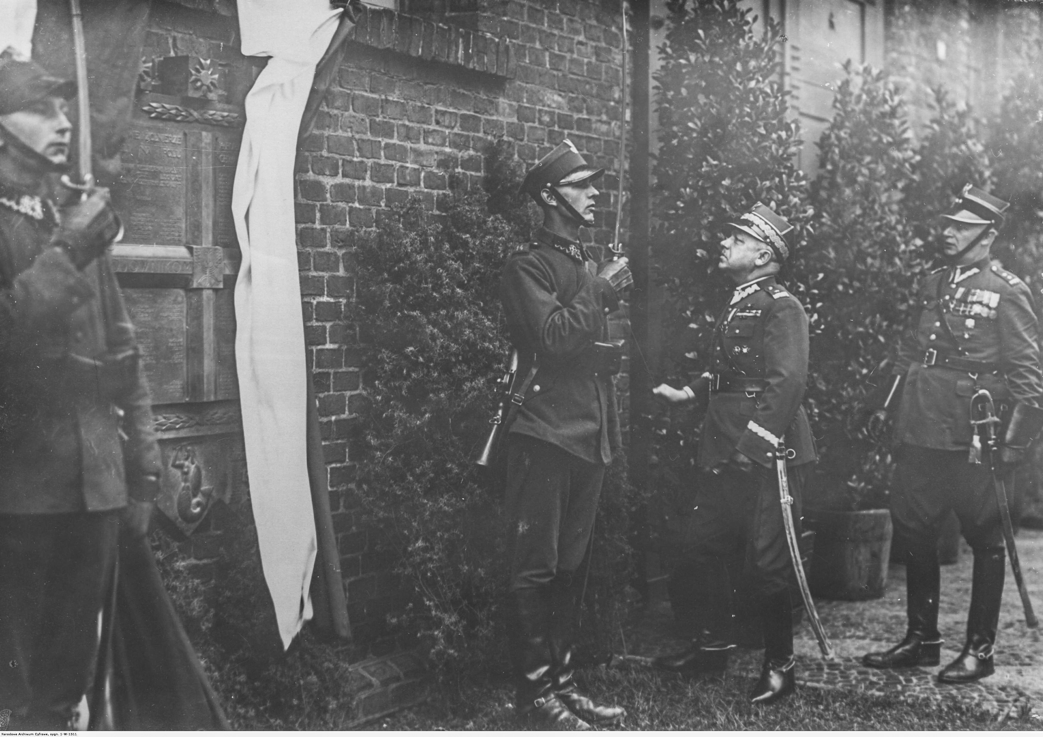 XX - lecie 14 Pułku Artylerii Lekkiej Wielkopolskiej z Poznania. Gen. bryg. Edmund Knoll-Kownacki odsłania tablicę pamiątkową na terenie koszar 14 pal-u. Koncern Ilustrowany Kurier Codzienny - Archiwum Ilustracji. Sygnatura: 1-W-1511